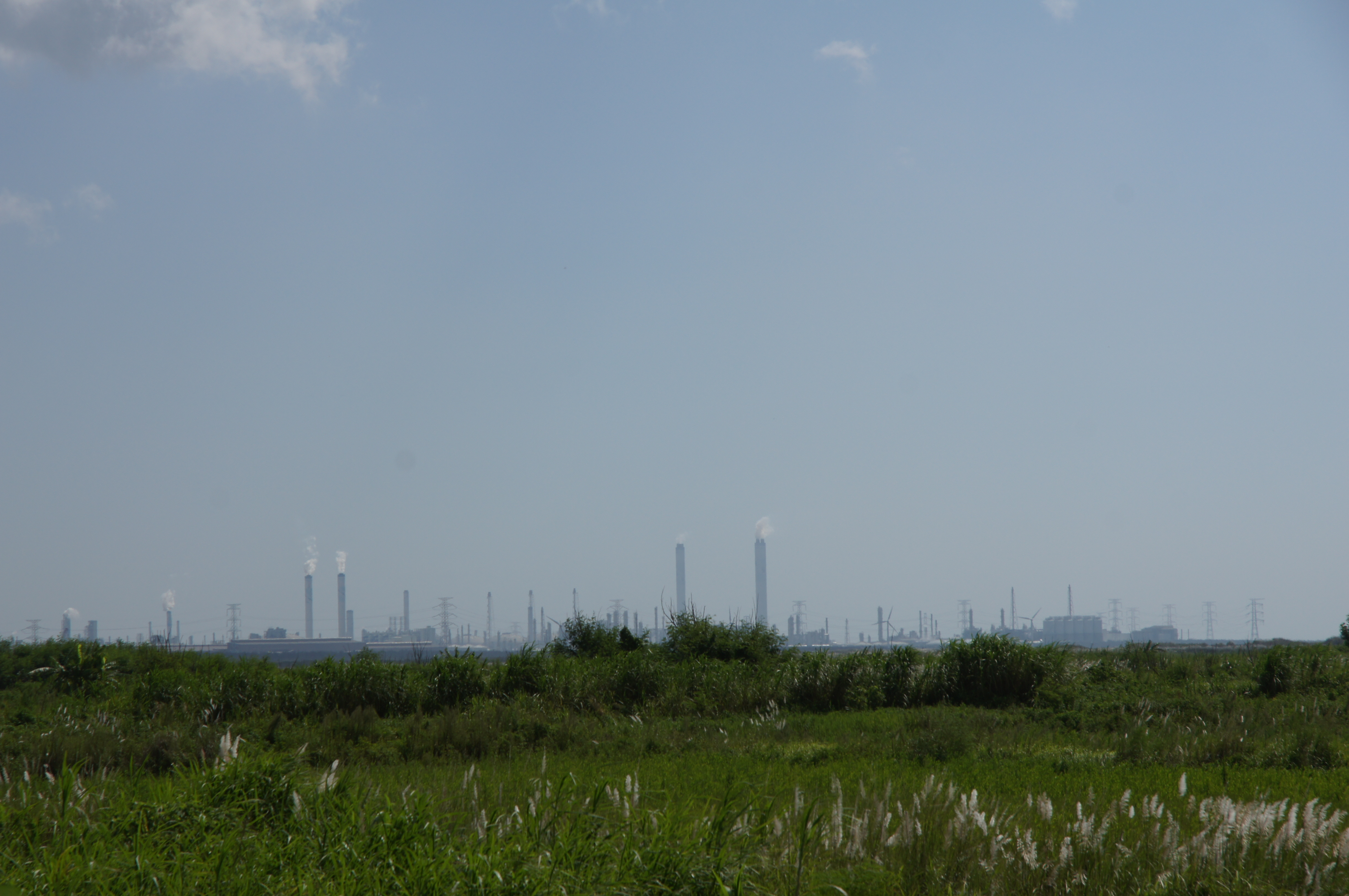 濁水溪堤防往南可見六輕的煙囪群